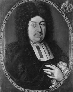 Gemälde in der Professorengalerie Tübingen